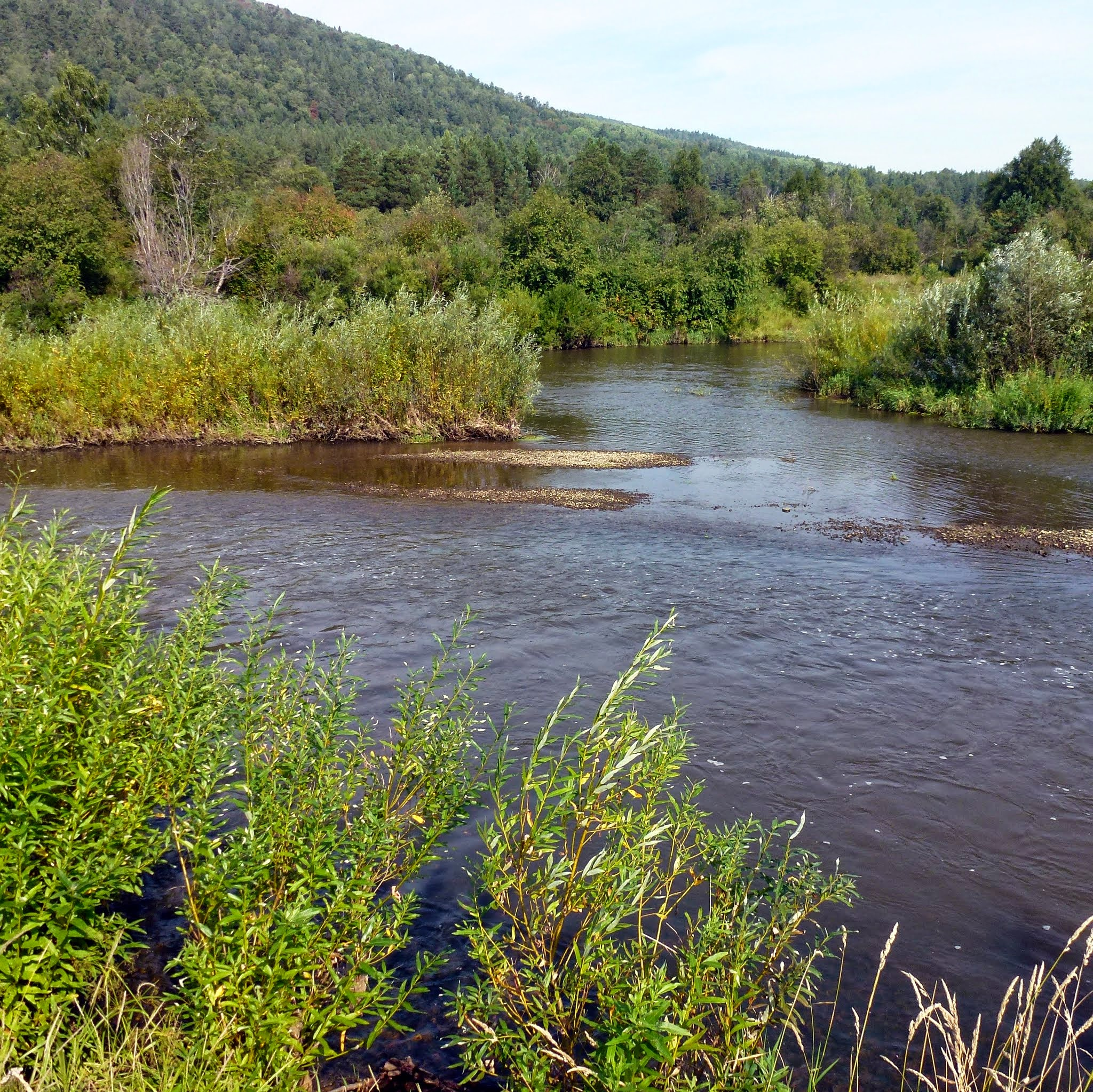 Река Белая, Башкортостан